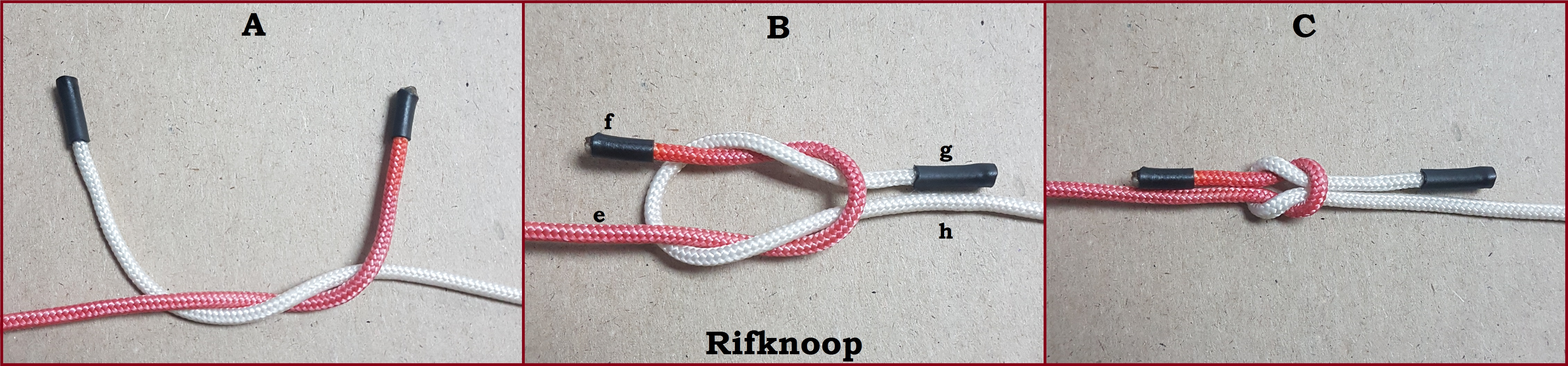 Aanwysing hoe om 'nRifknoop te maak.